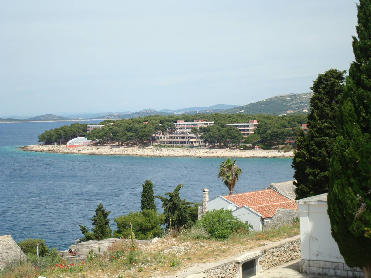 Vue du complexe hôtelier depuis le village de Primosten (Croatie)